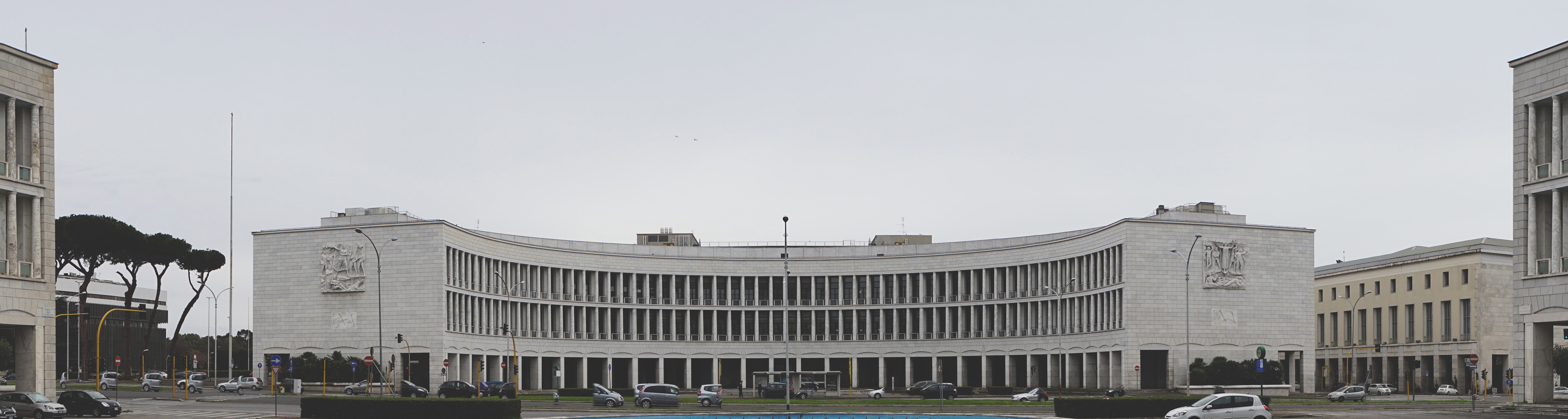 Gebäude des Istituto Nazionale Assicurazioni (INA) in EUR, Rom (1938–52)